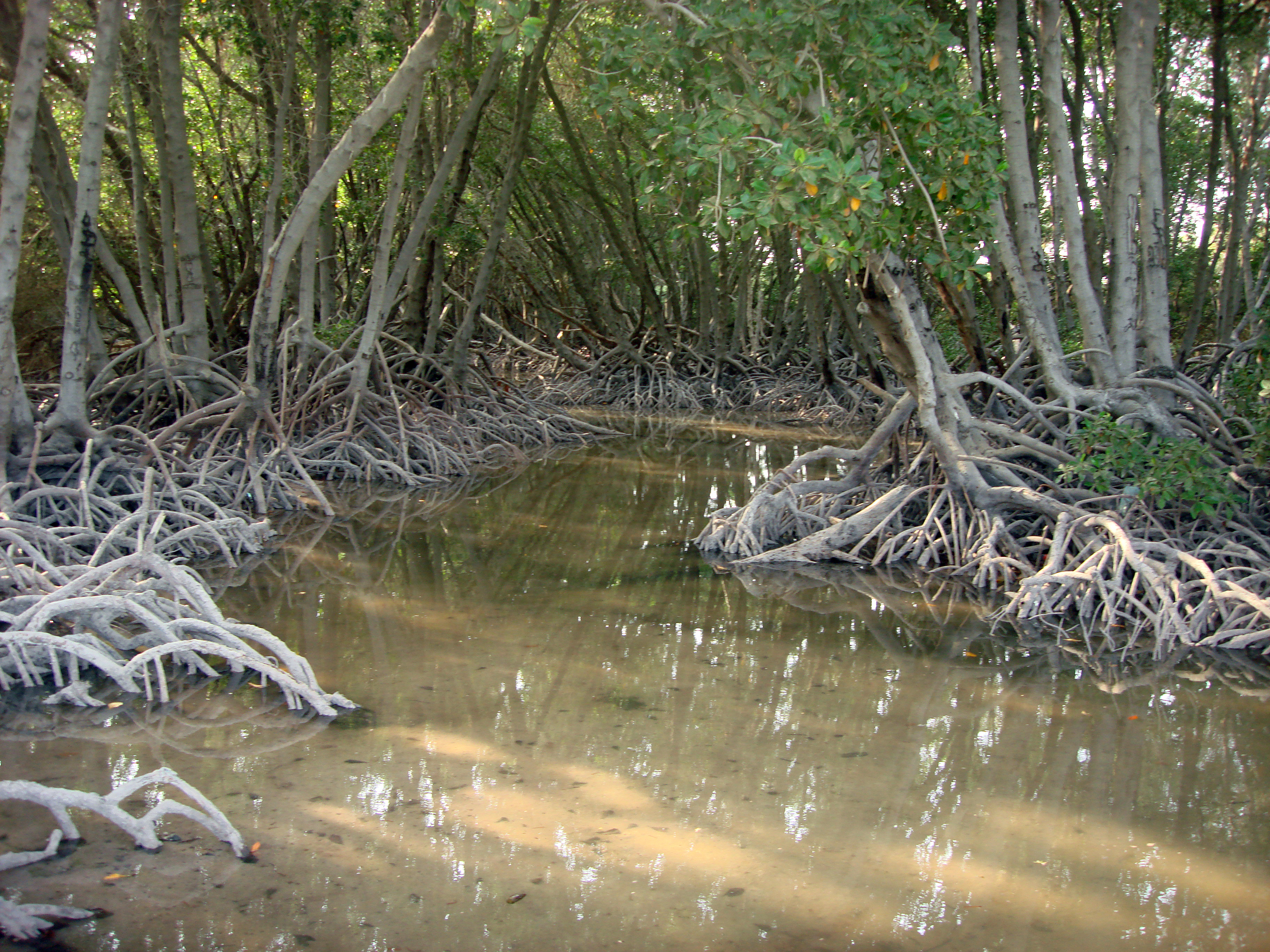 ils moucha This is an image of Cultural Fashion or Adornment from Djibouti